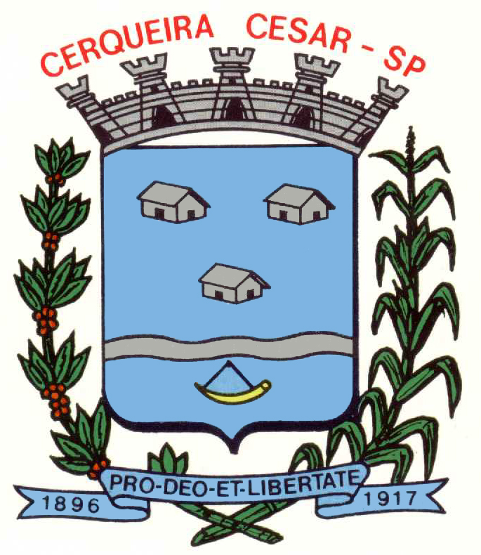 Brasão do município de Cerqueira César, São Paulo, Brasil